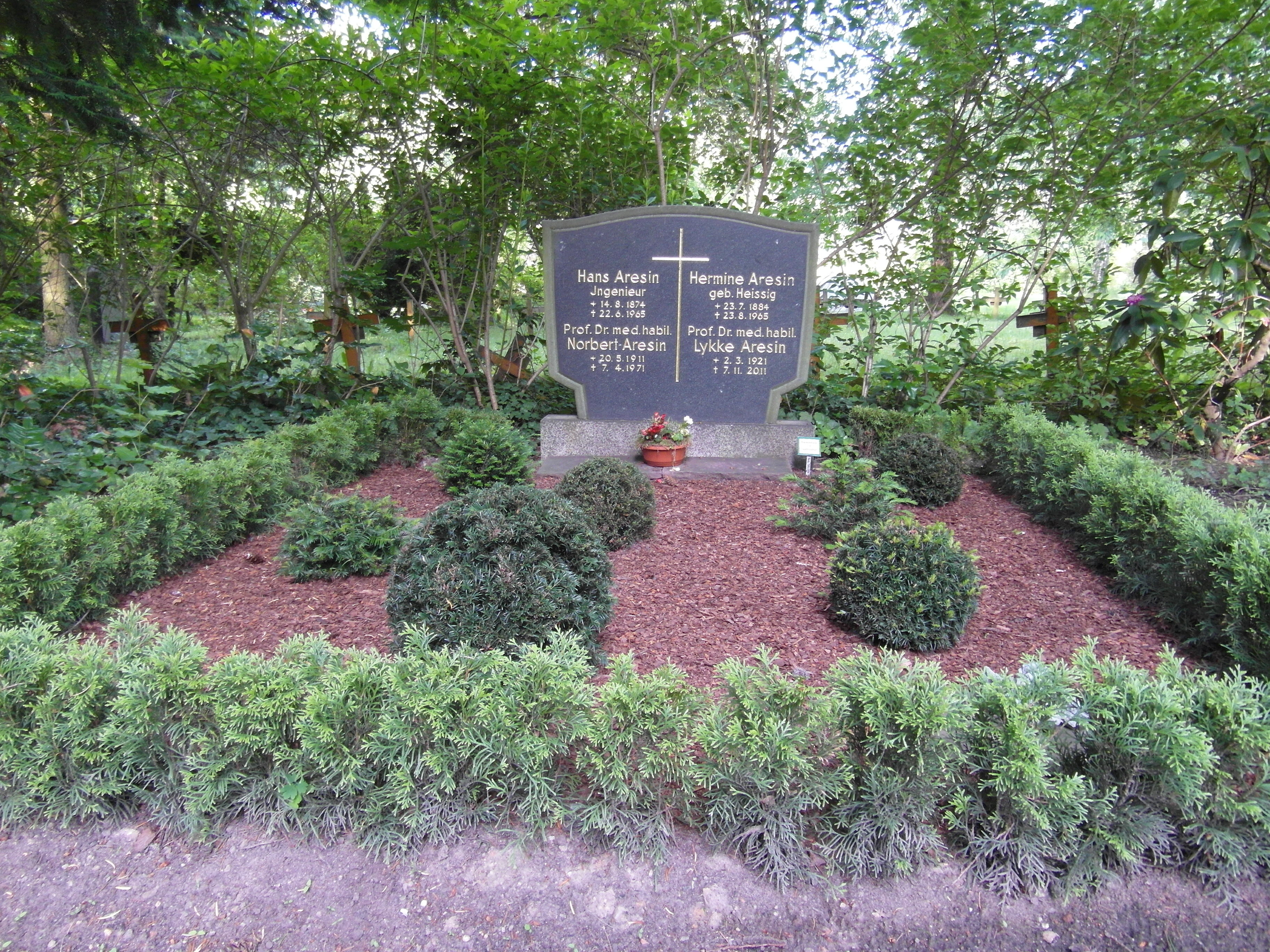 Grabstätte Norbert und Lykke Aresin